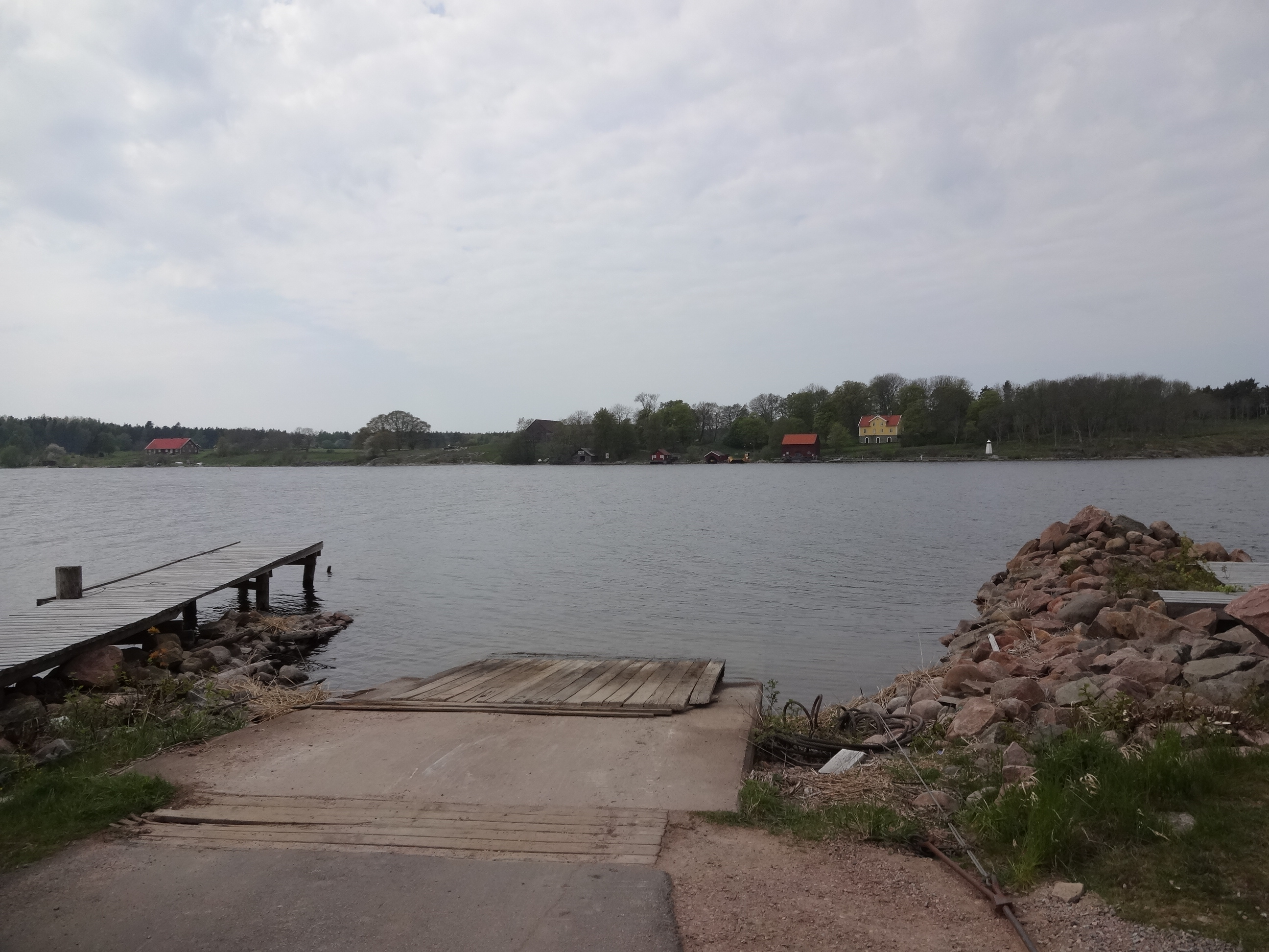 Brommösund och ön Brommö sedd från Torsö